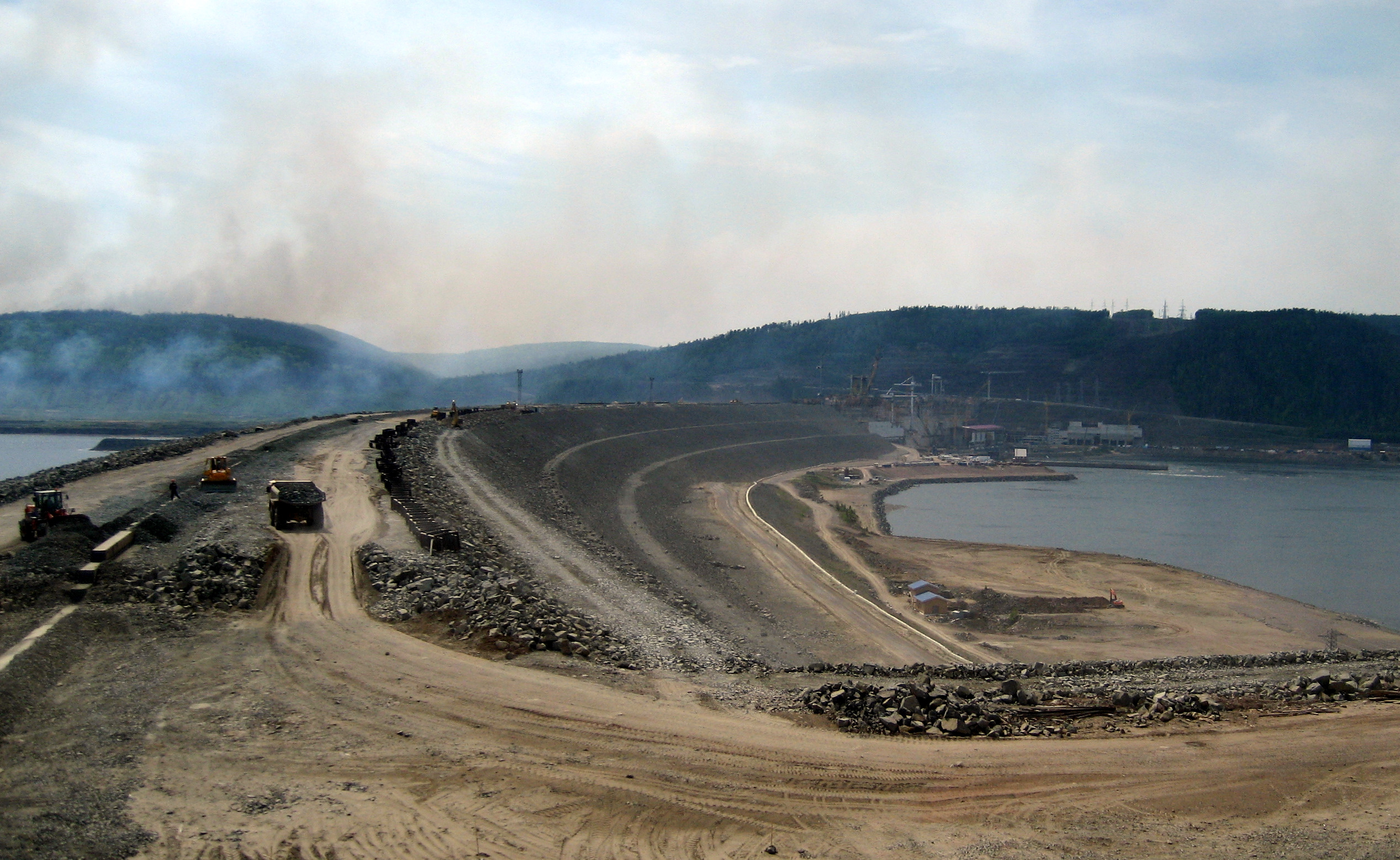 Каменно-набросная плотина Богучанской ГЭС